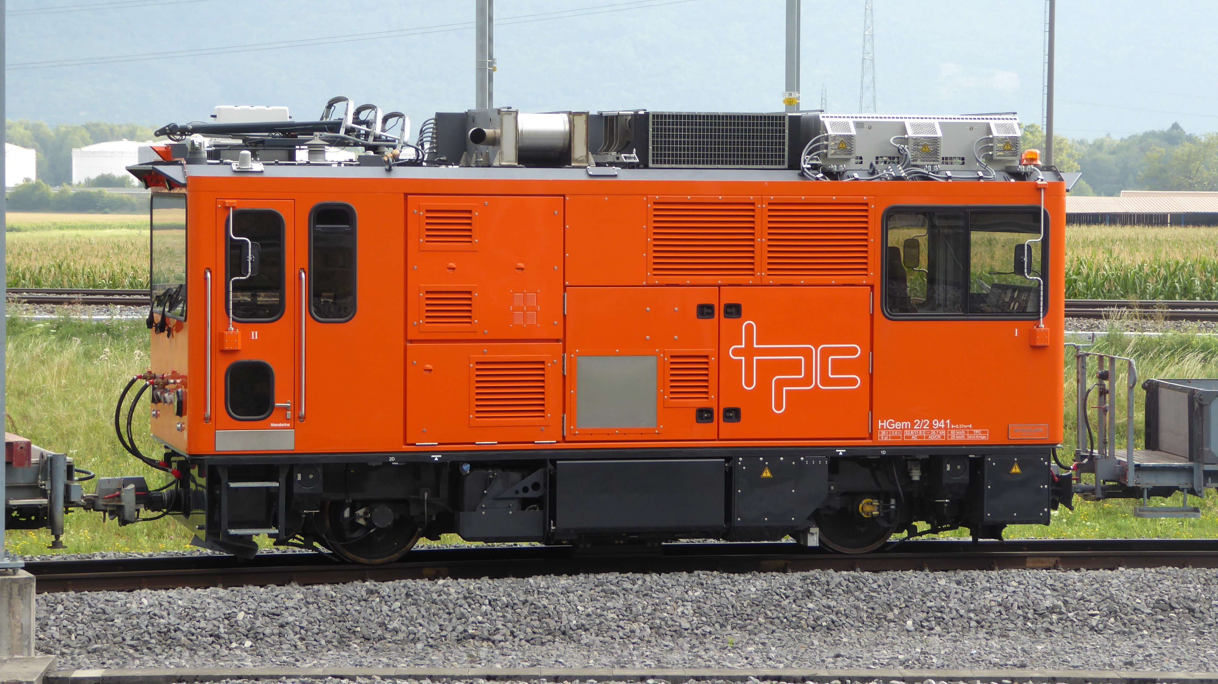 Zahnradlokomotive HGem 2/2 941 vor der TPC-Werkstätte En Châlex